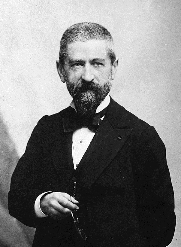 Émile Duclaux